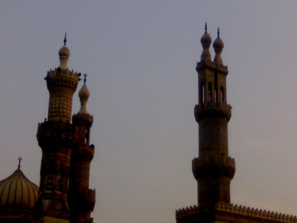 مآذن الأزهر في الغروب